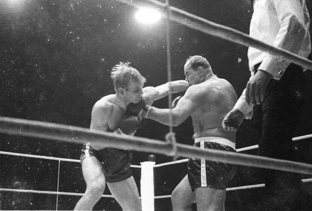 in der Ostseehalle. Boxer Peter Weiland (rechts) besiegt Jürgen Blin (links) nach Punkten.